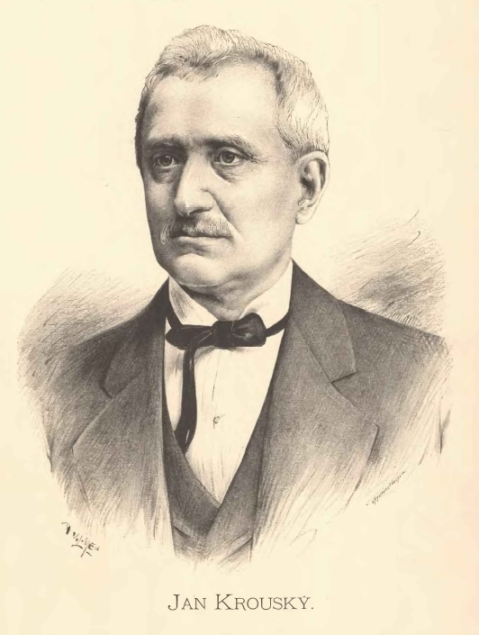 Portréty předních osobností od Jana Vilímka: Jan Krouský (1814 - 1876), místní politik a organizátor českého hospodářského života na Mladoboleslavsku.